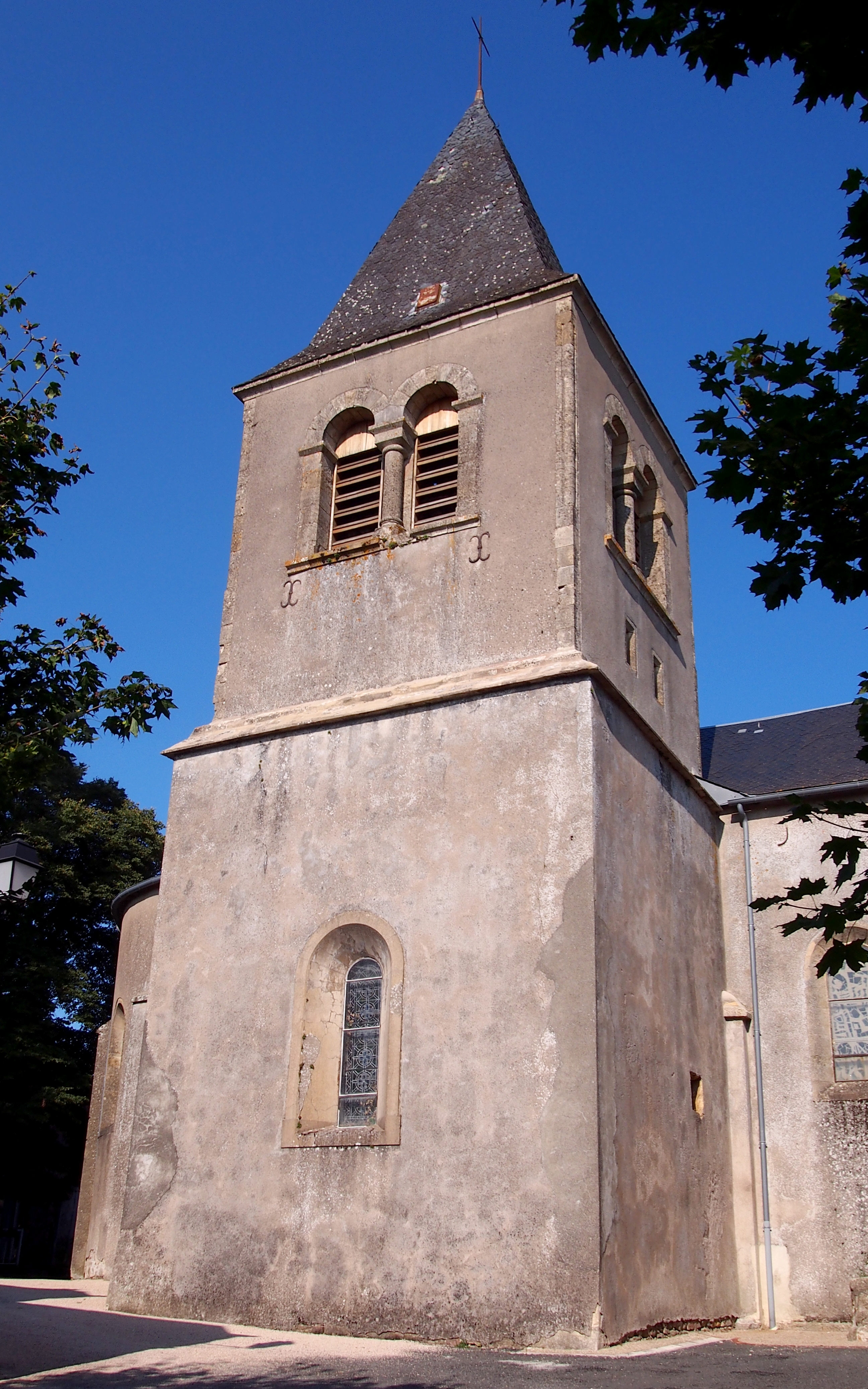 Druhle (Occitanie, France). Le clocher de l'église Notre-Dame.